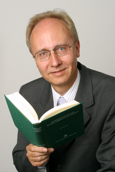 Prof. Dr. Harald Dörig, Bundesrichter am Bundesverwaltungsgericht in Leipzig und Honorarprofessor für Rechtswissenschaften an der Friedrich Schiller-Universität Jena